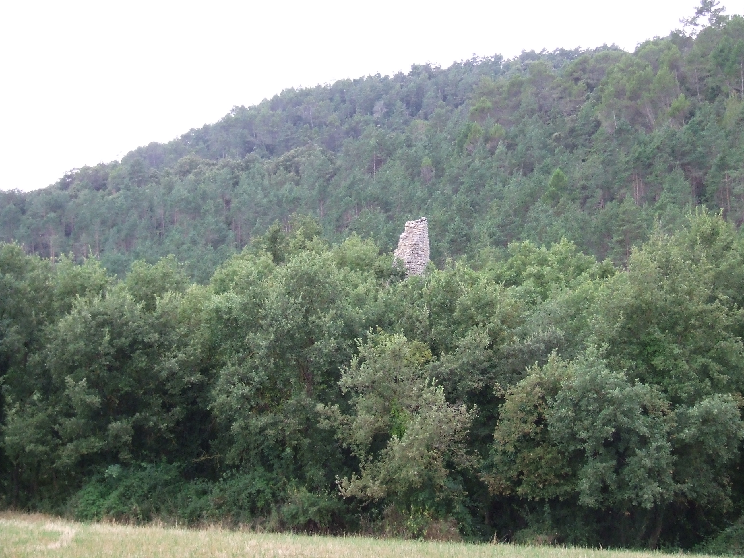 La Torrassa dels Moros (Castellcir, Moianès)